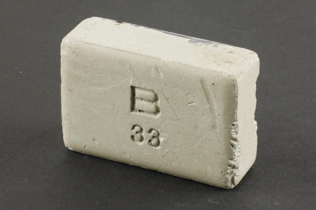 Et stykke B-såpe fra andre verdenskrig.